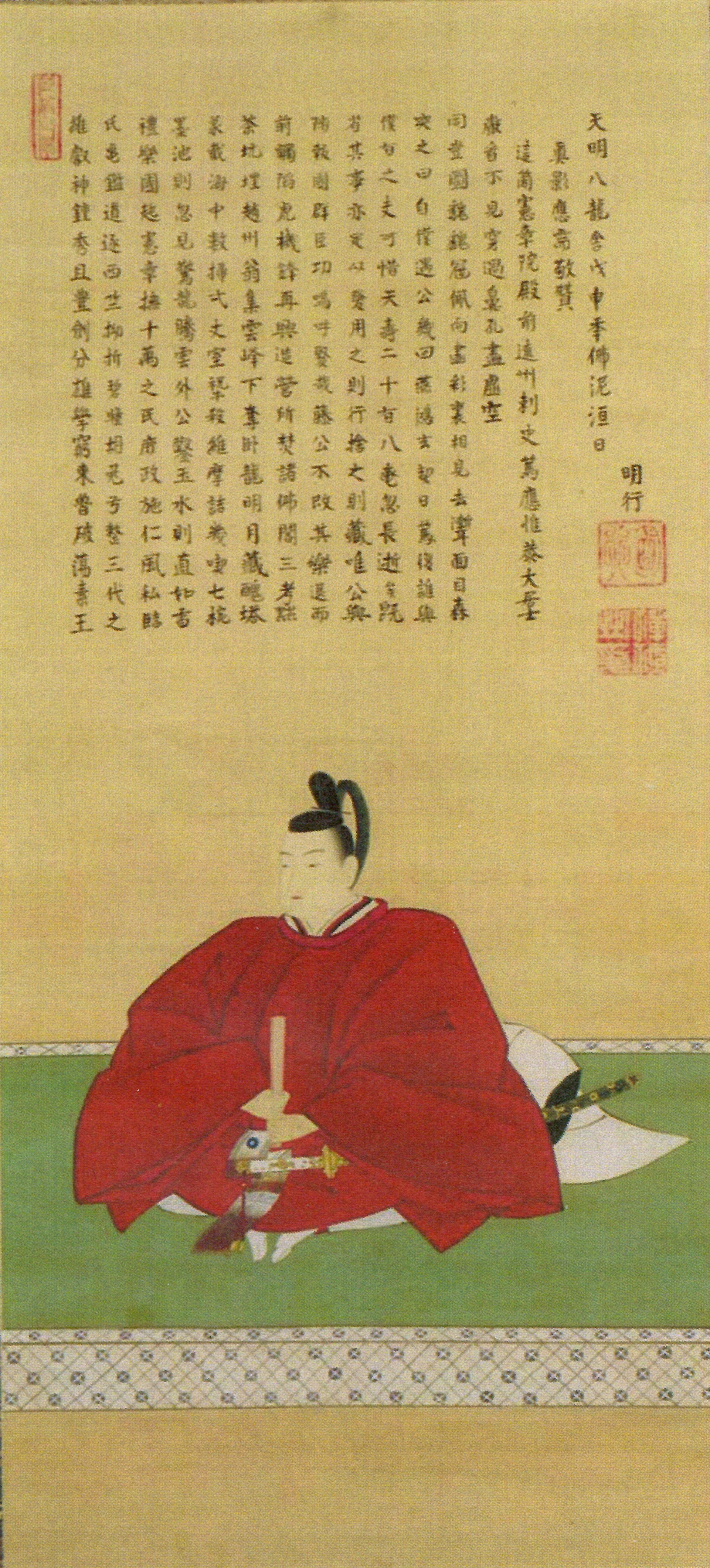 加藤泰侯の肖像。